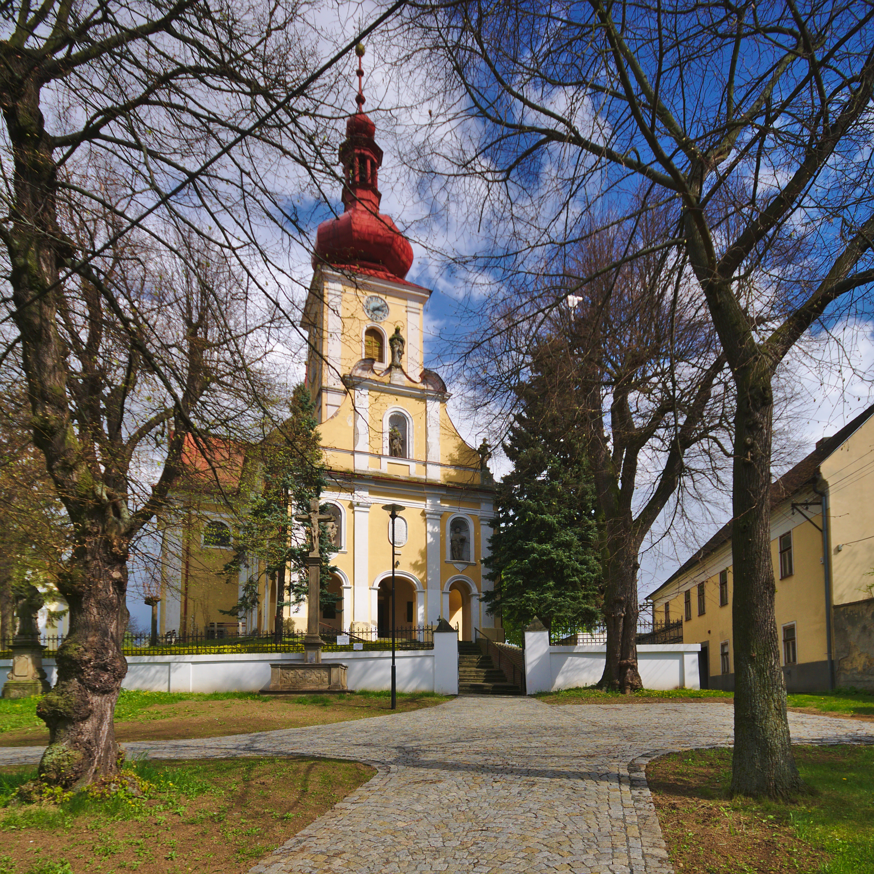 Kostel svatých Petra a Pavla, Tištín, okres Prostějov